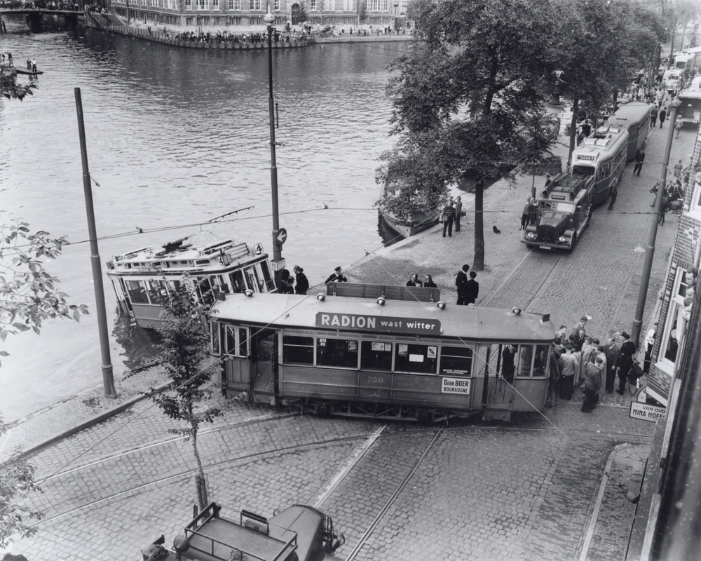 Tram 4 mist de bocht bij de Bakkersstraat rijdt de Amstel in, 5 september 1950 Foto Ben van Meerendonk / AHF, collectie IISG, Amsterdam